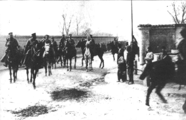 Лейбгвардейският конен полк влиза в Одрин при превземането на града